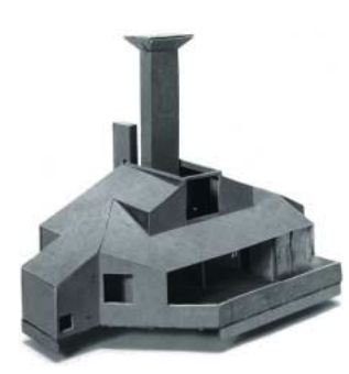 Het middelvingerontwerp voor het Vanna Venturi House